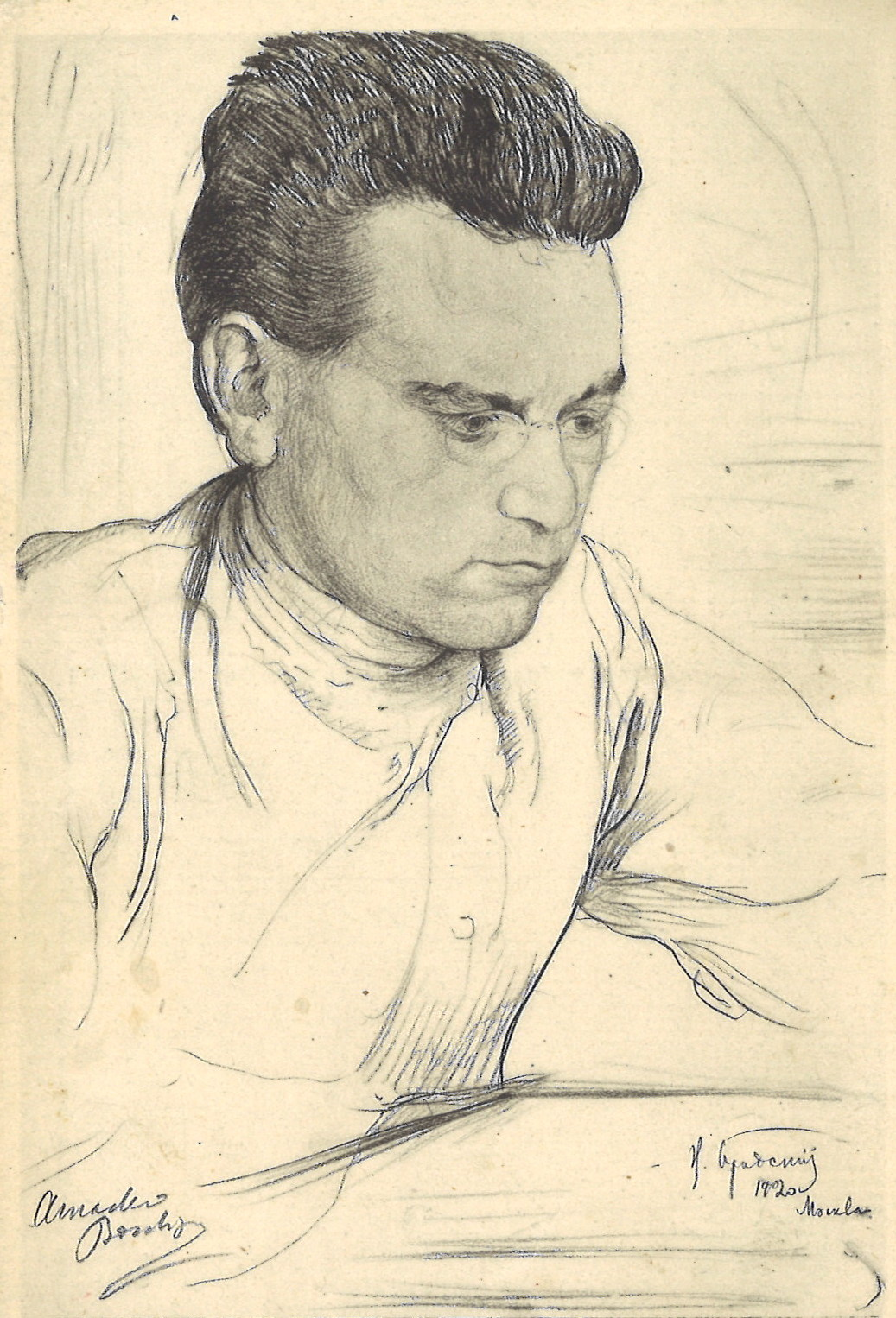 Carte postale soviétique représentant la leader communiste italien Amadeo Bordiga, d'après un dessin d'Isaak Brodsky.